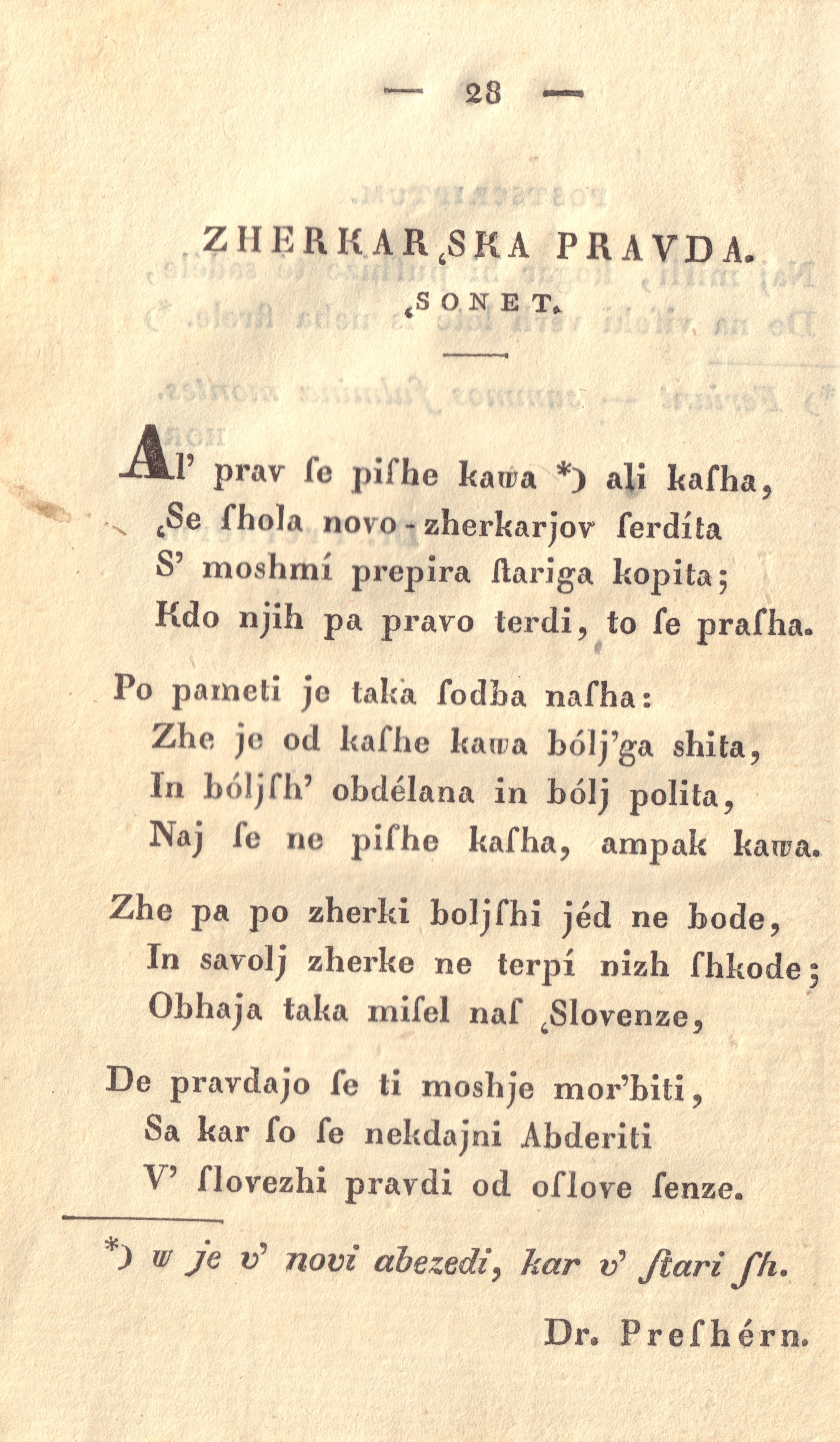 Črkarska pravda.